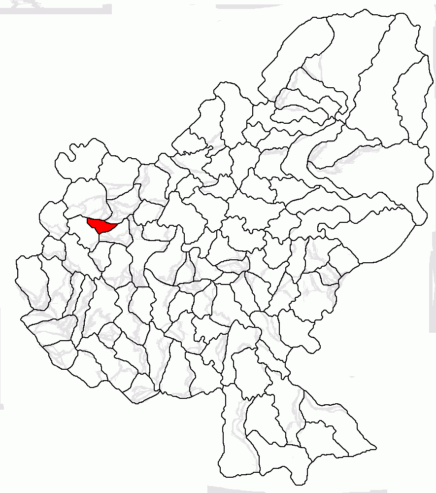 Categorie:Hărţi ale judeţului Mureş